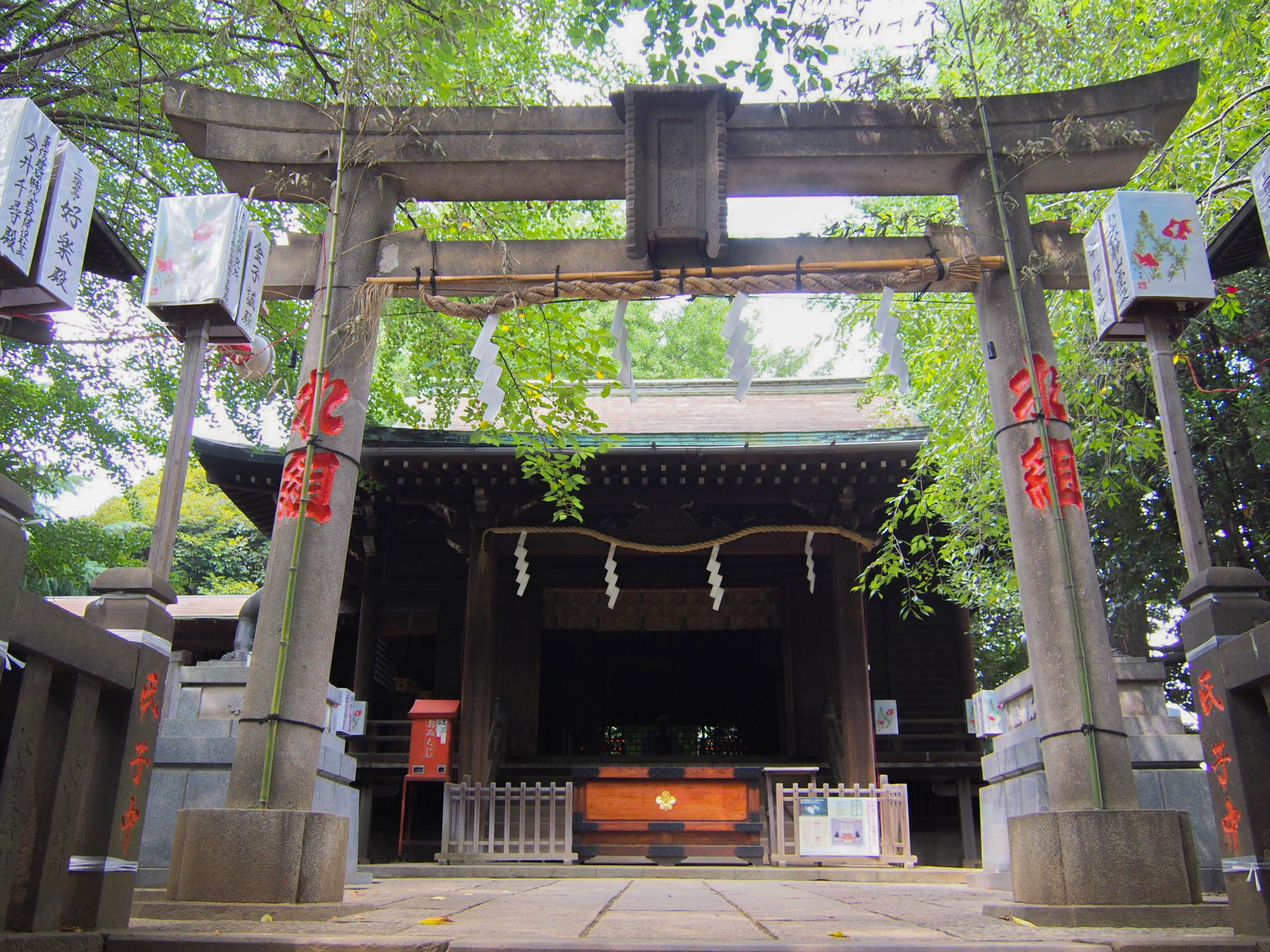 東京都荒川区西日暮里 諏方神社 - 鳥居